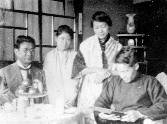 蔣渭水(最右)與陳甜及黃呈聰夫妻(左二)在大安醫院裡。